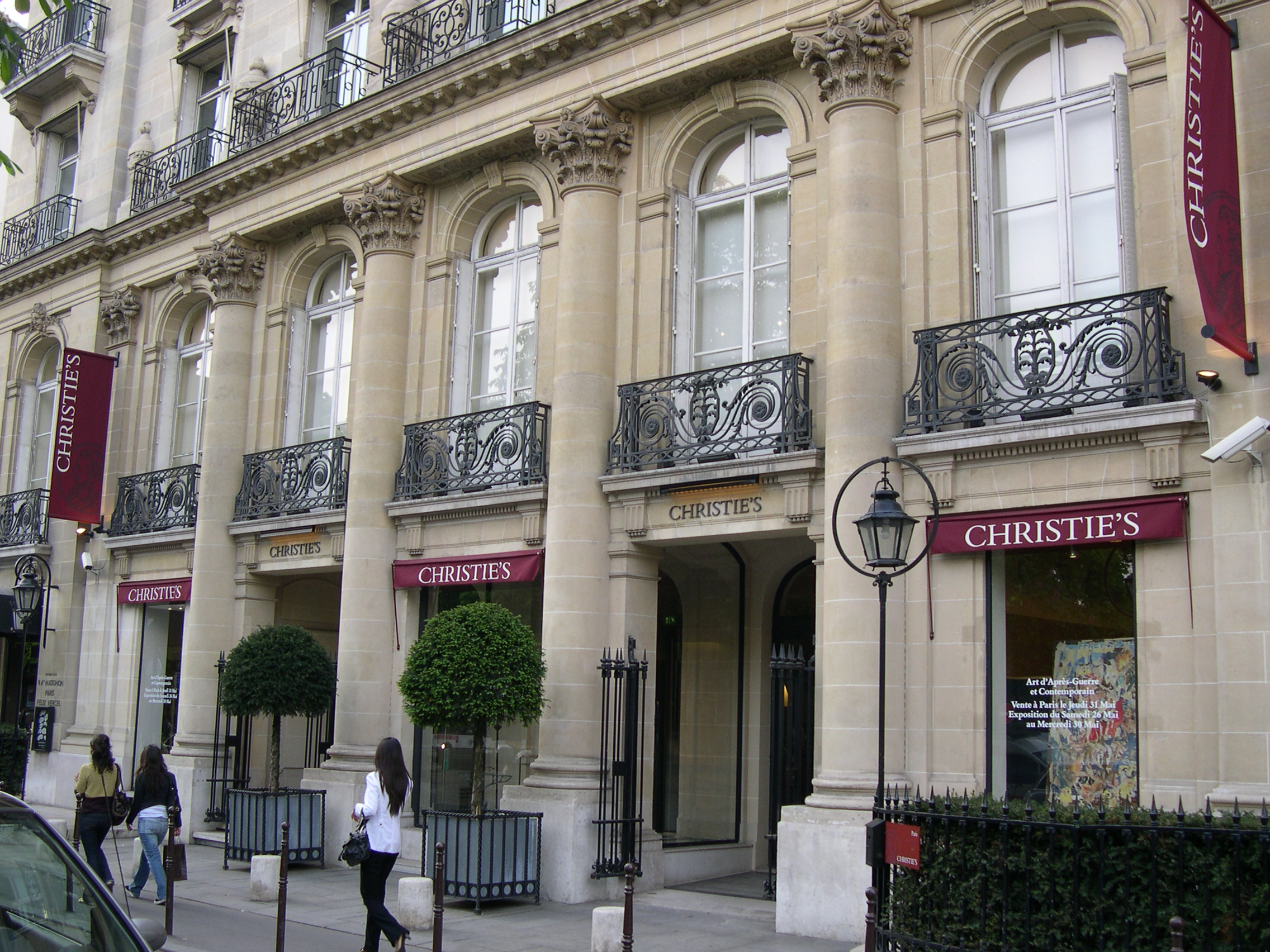 Christie's, 9 Avenue Matignon, 75008 Paris, France .